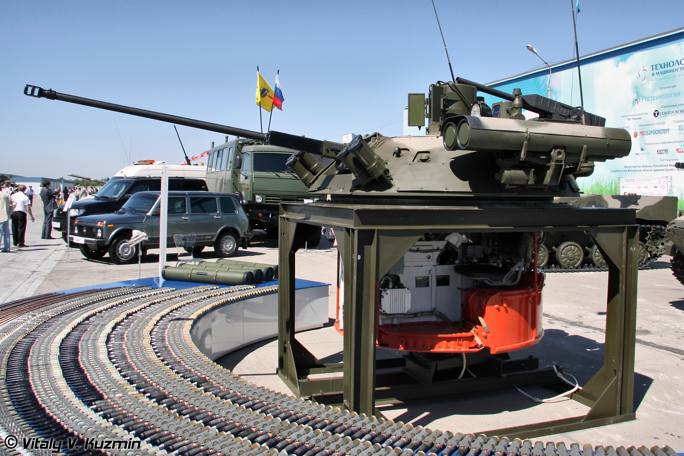 Комплекс вооружения "Бережок" (Berezhok)